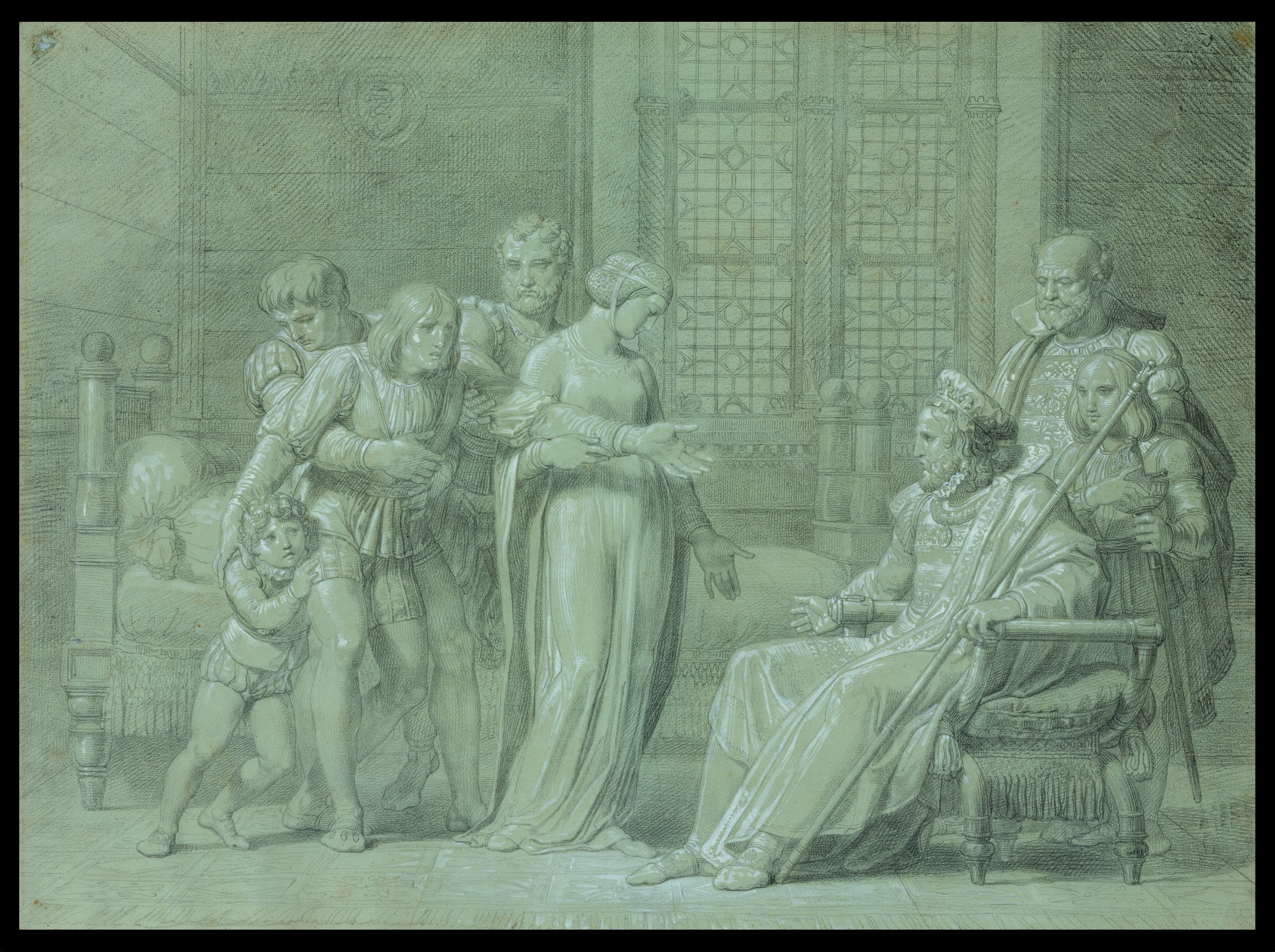 Drawing; Drawings